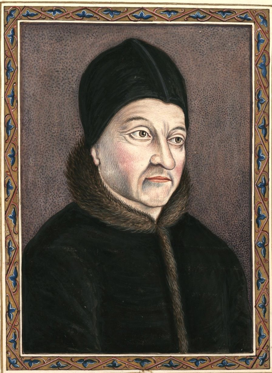 Jean d'Orléans, comte de Dunois et de Longueville. Album « Recueil de costumes de François Roger de Gaignières », XVIIe siècle, Paris, Bibliothèque nationale de France.